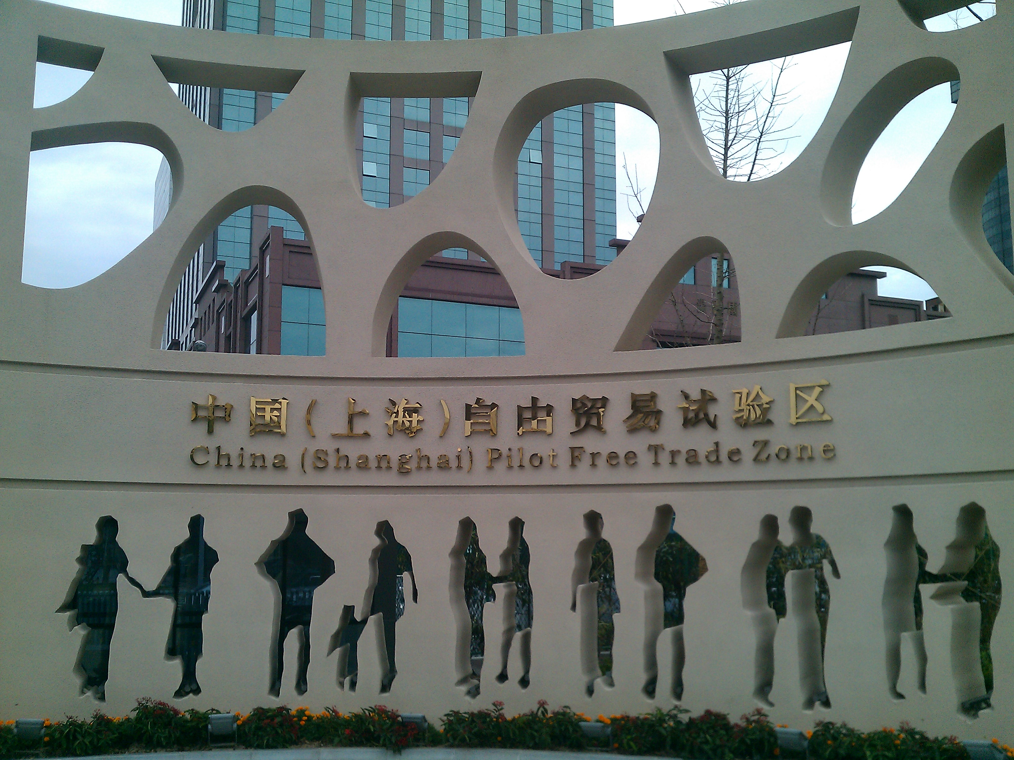 中文（中国大陆）: 中国（上海）自由贸易试验区二号门，位于上海外高桥保税区。